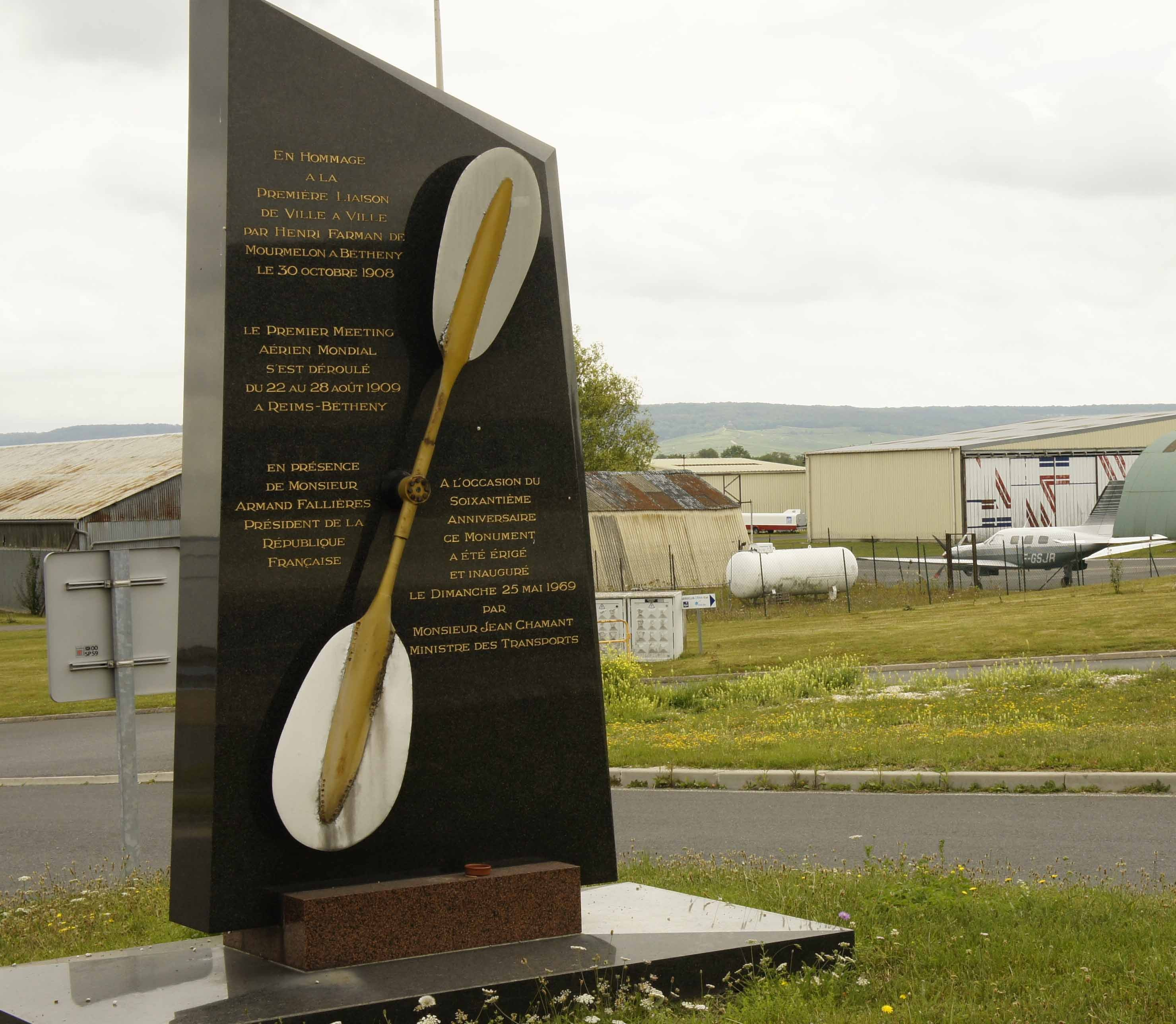 Monument commémoratif inauguré e 25 mai 1969 par Jean Chamant, se situant devant l'aérodrome de Prunay. Souvenir du premier vol reliant deux villes Mourmelon/Bétheny le 30 octobre 1908; le premier meeting aérien 22 au 28 août 1909. Les hangards de l'aéroport en arrière plan.